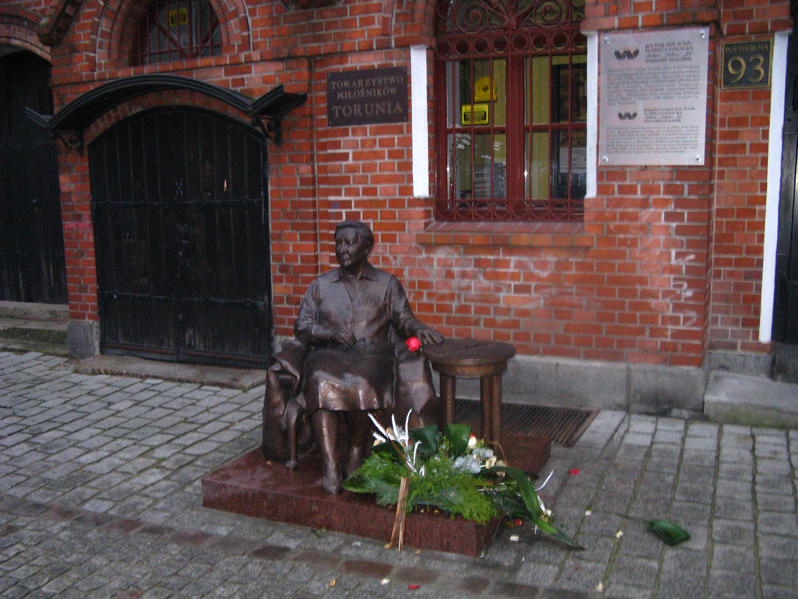 Pomnik Elżbiety Zawackiej w Toruniu, autorstwa Tadeusz Porębskiego, odsłonięty 23 września 2014